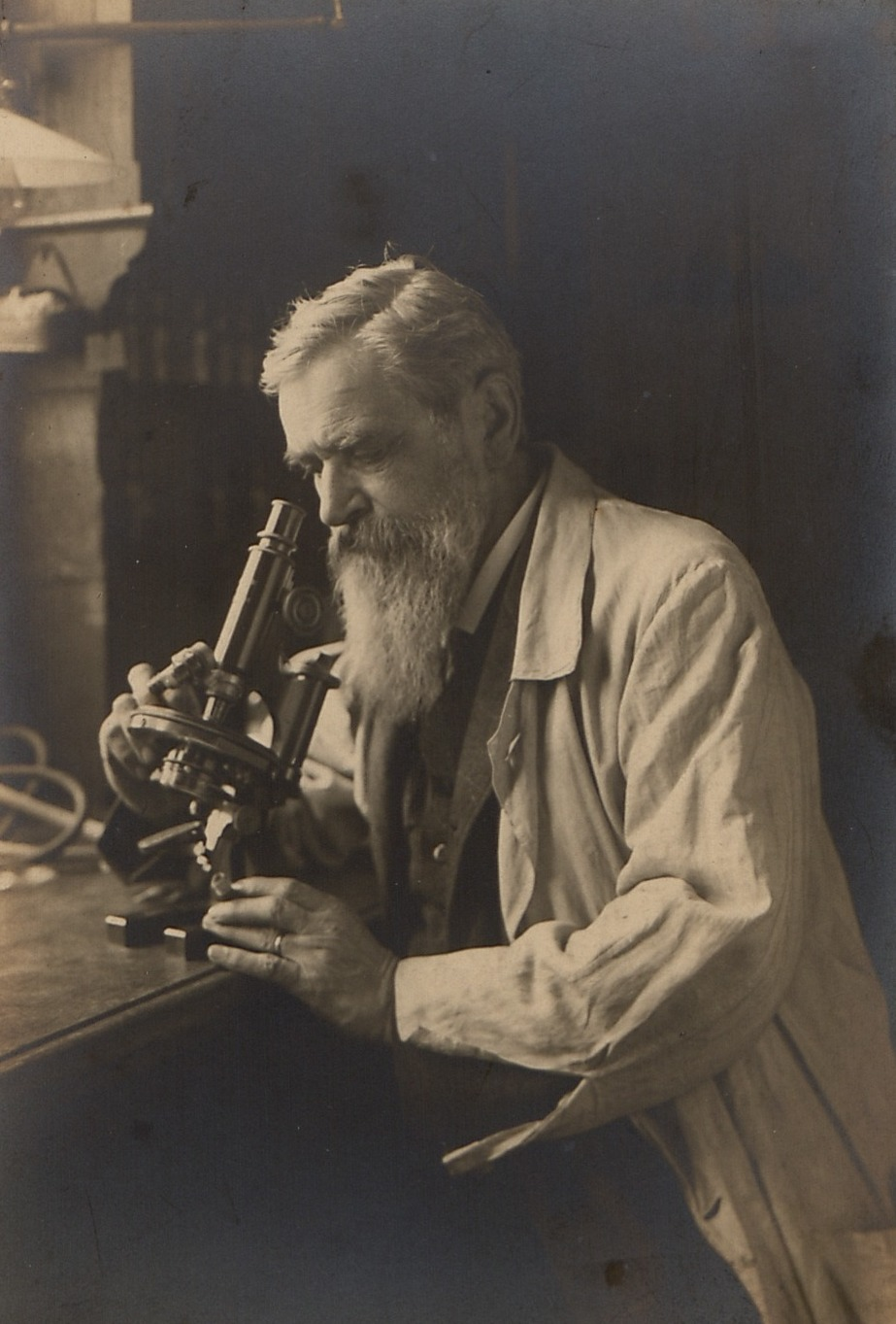 Otto Bütschli, Zoologe und Paläontologe, 1878–1920 Professor in Heidelberg